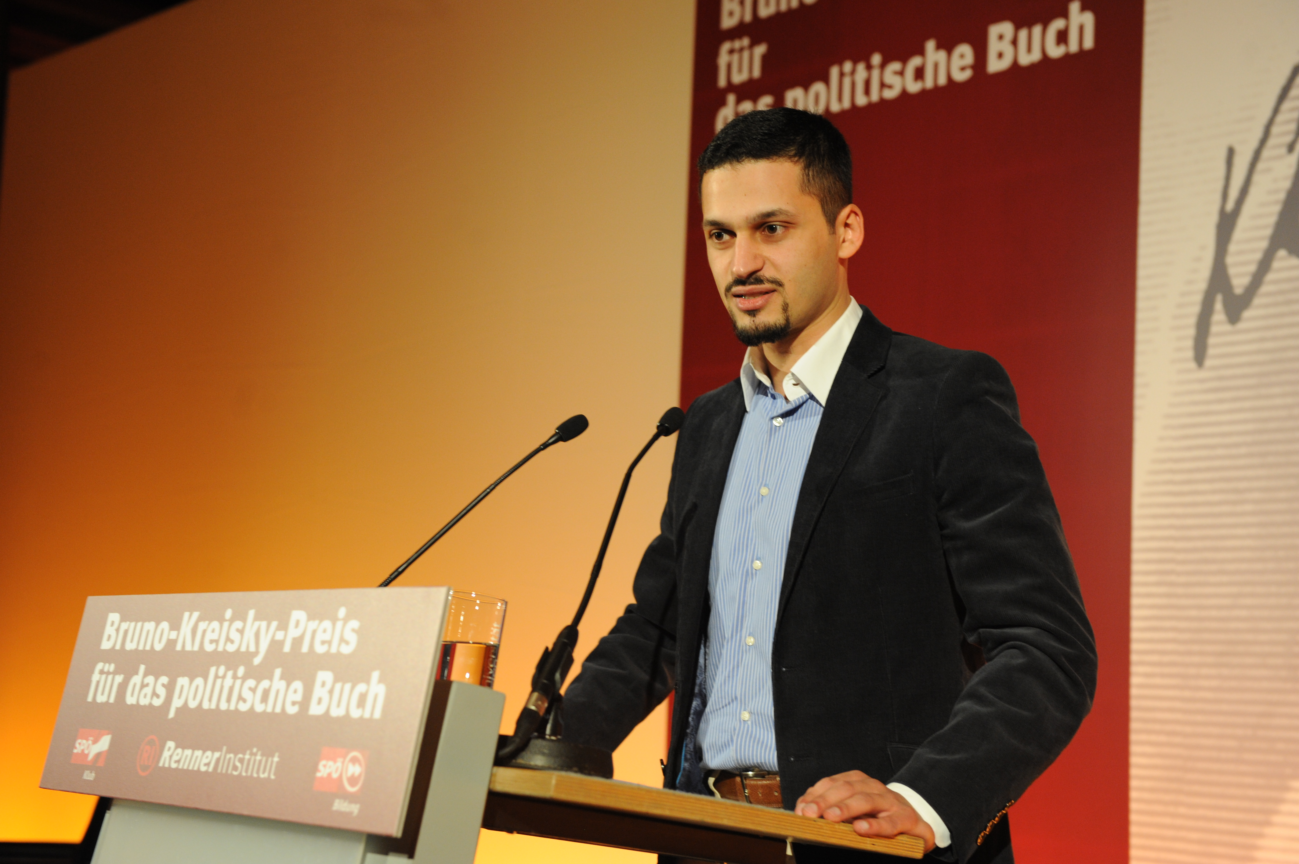 Farid Hafez spricht bei der Preisverleihung des Bruno-Kreisky-Anerkennungspreis 2010